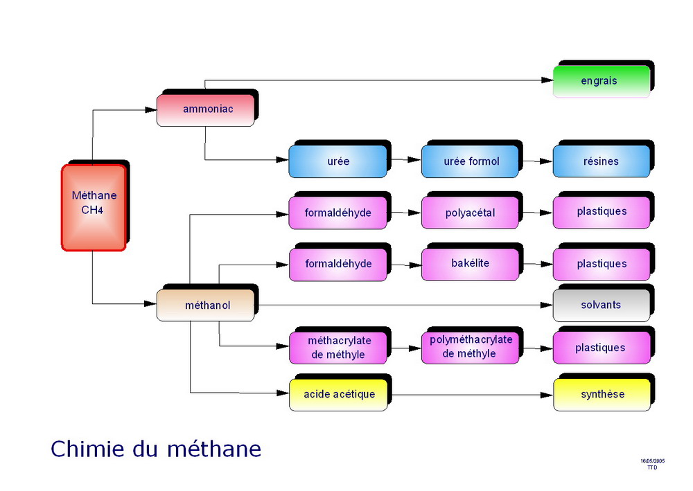 Ce schéma vient d'être dessiné par moi-même aujourd'hui 16/05/2005 à Paris pour illustrer des articles dans Wikipédia.